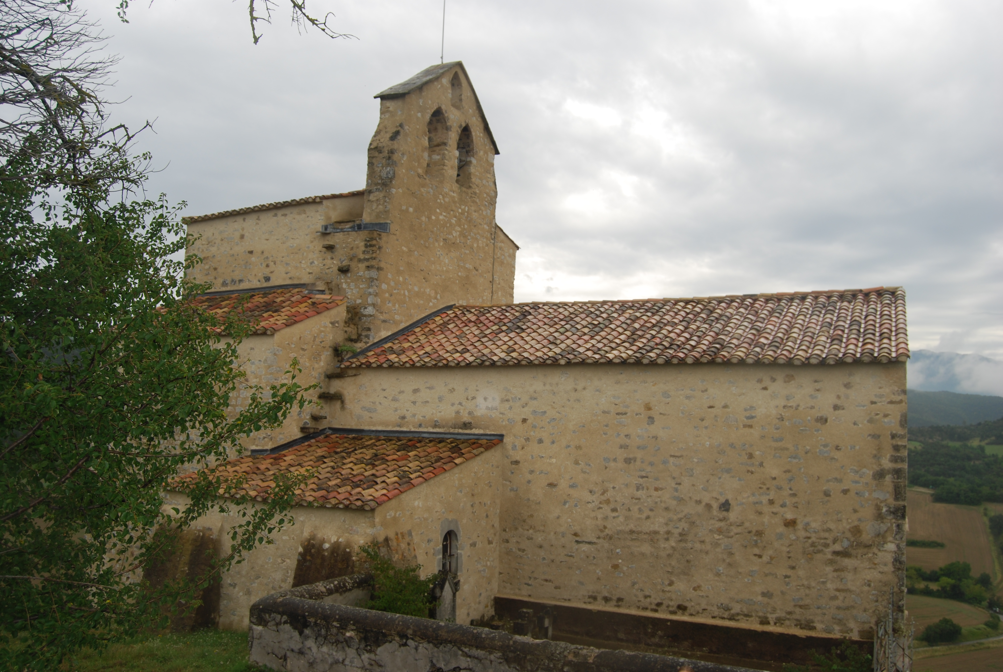 L'église vue en entier.